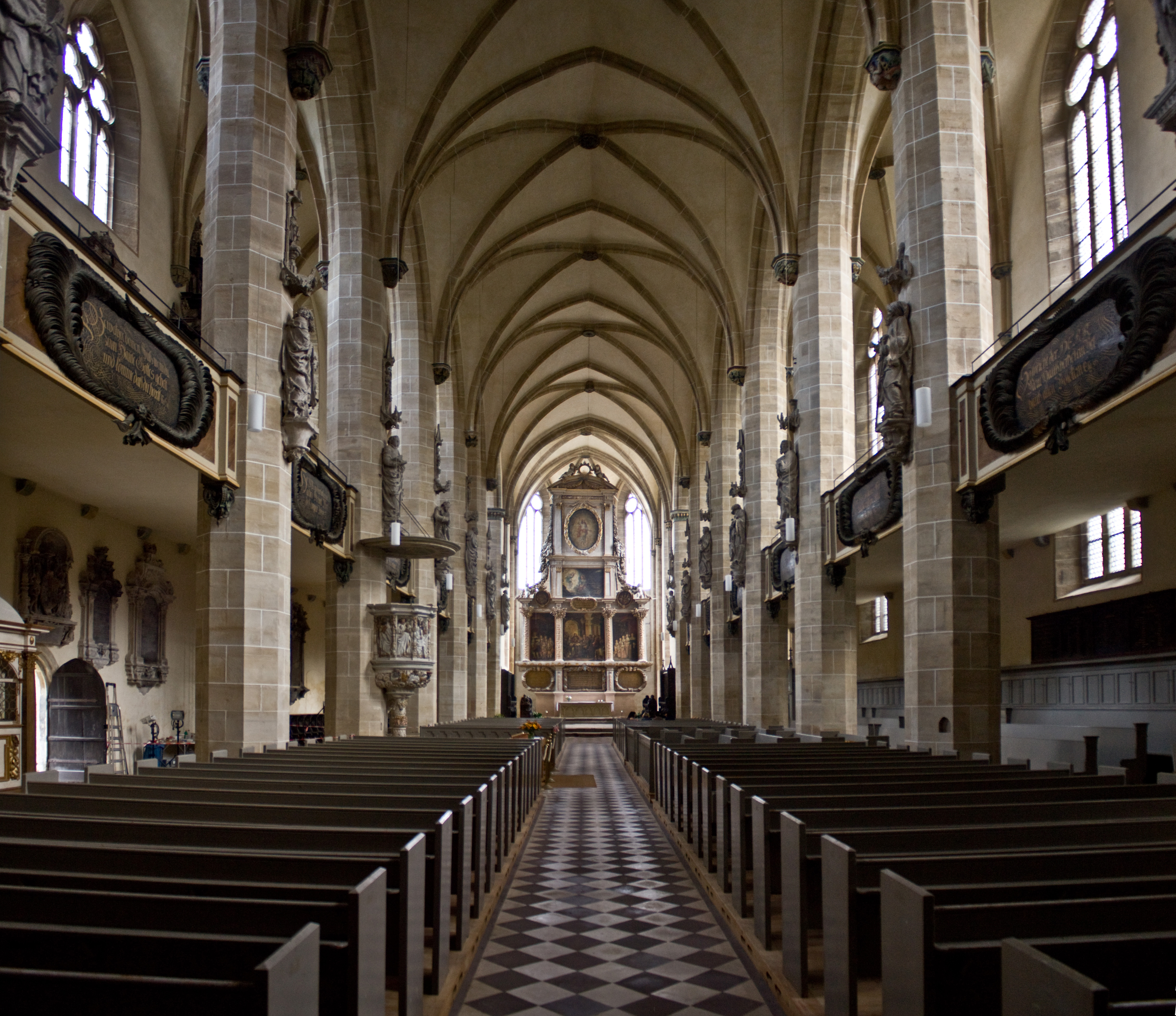 Dom zu Halle